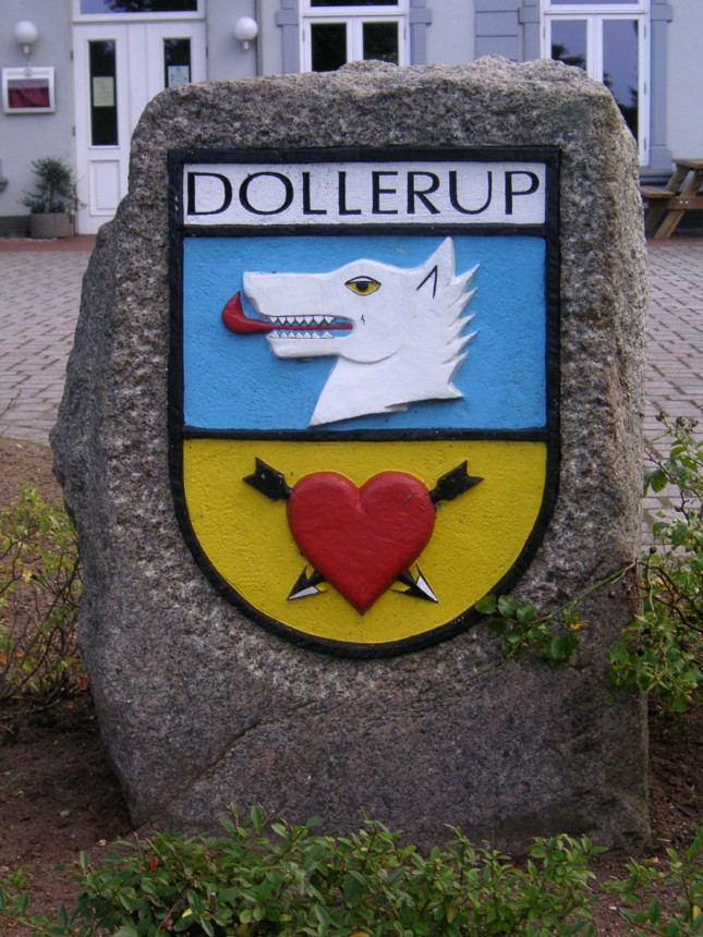 Wappen von Dollerup/Deutschland